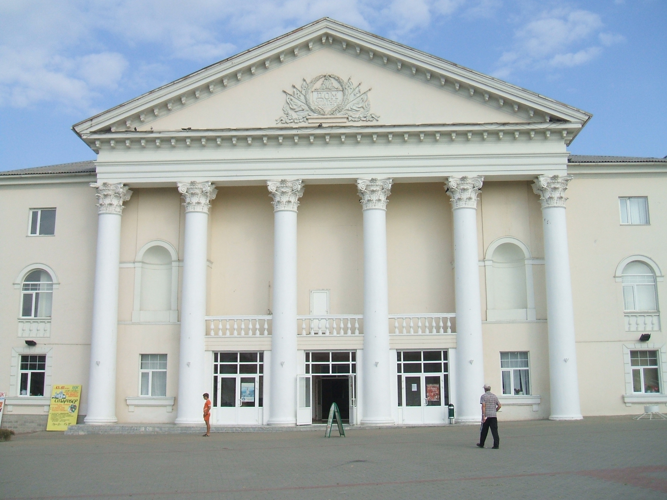 дворец культуры в г.Темрюк